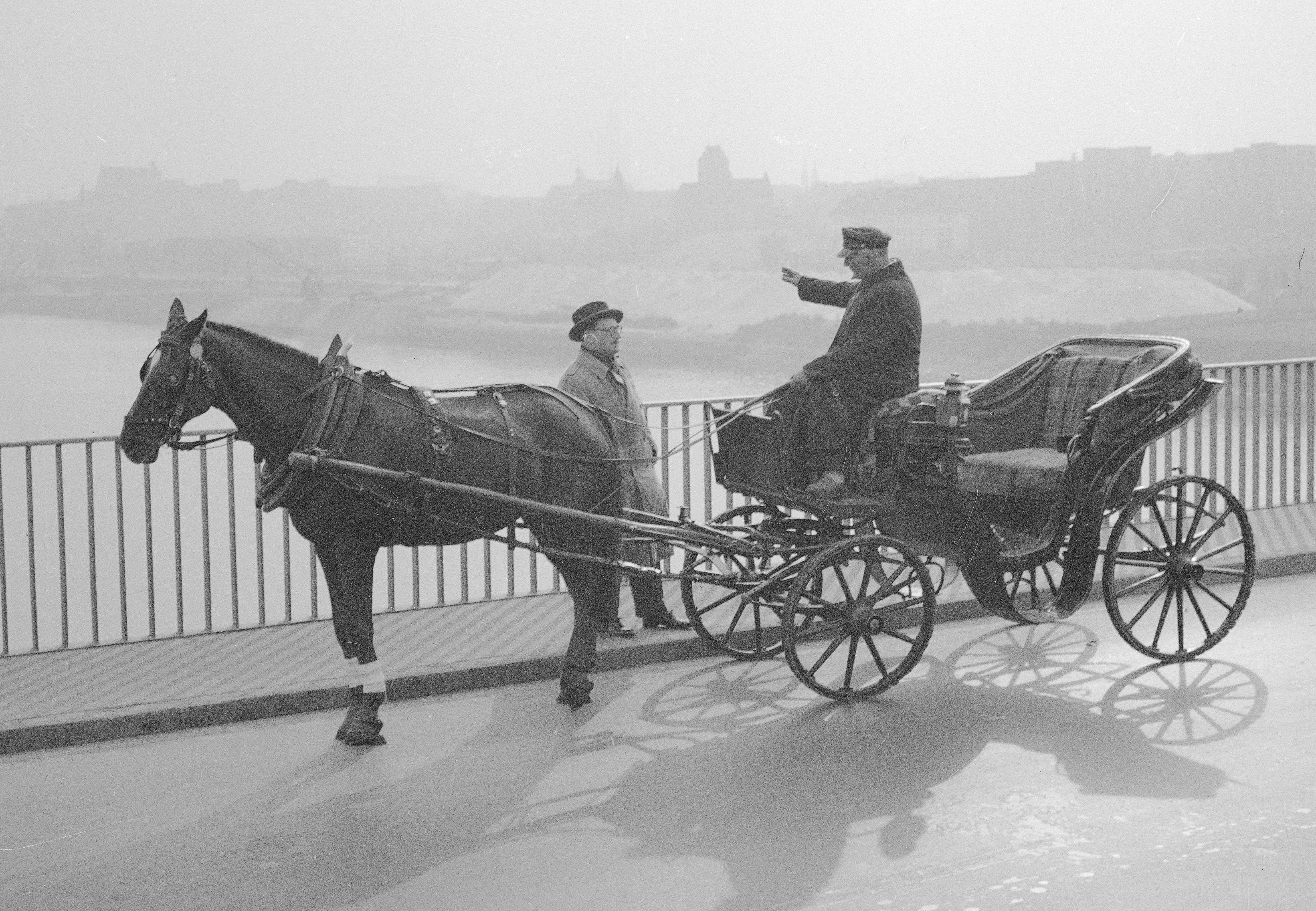 Stefan Wiechecki w rozmowie z dorożkarzem